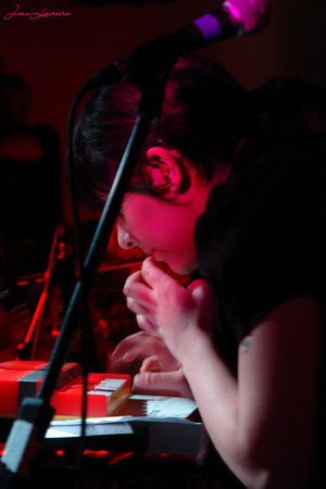 Sónia Tavares, The Gift - Clinic Wonderful Life Foto: João Loureiro (C)